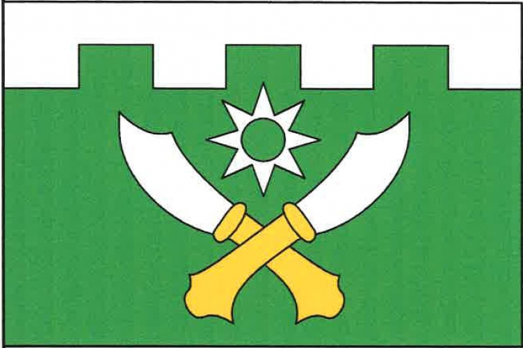 vlajka, Hostouň, okres Kladno